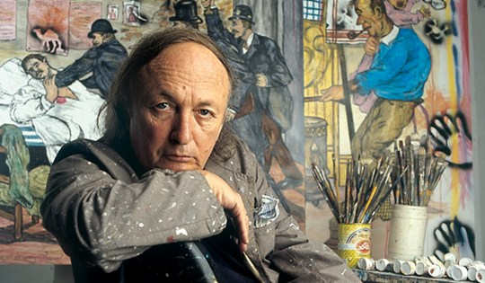 יאיר גרבוז - ציור ופיסול